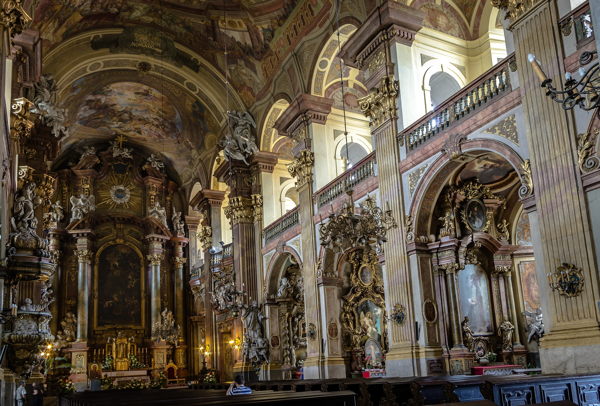 Kościół parafialny Najświętszego Imienia Jezus (Uniwersytecki) oo. jezuitów - wnętrze